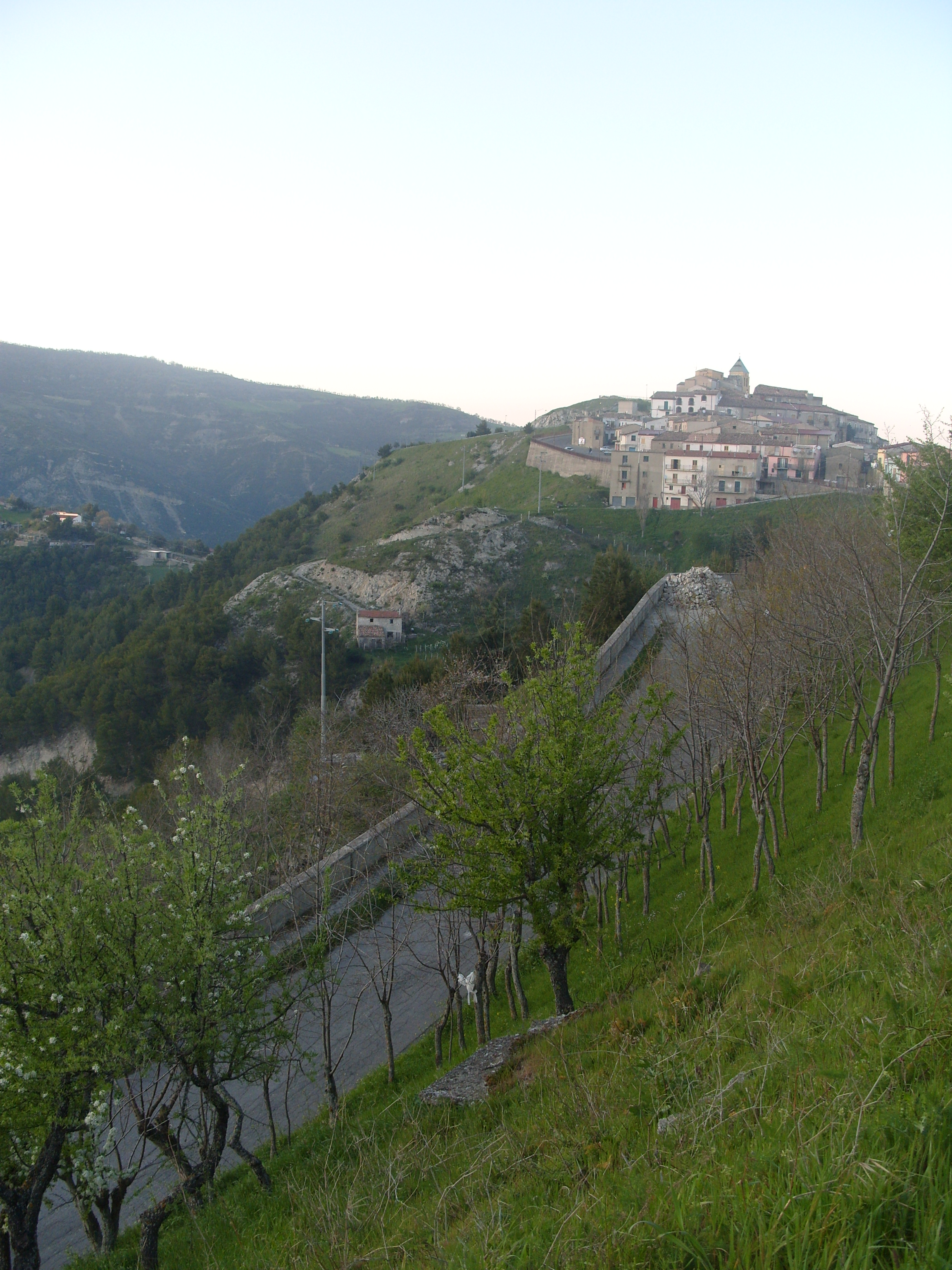 Albidona - Veduta del Centro Storico